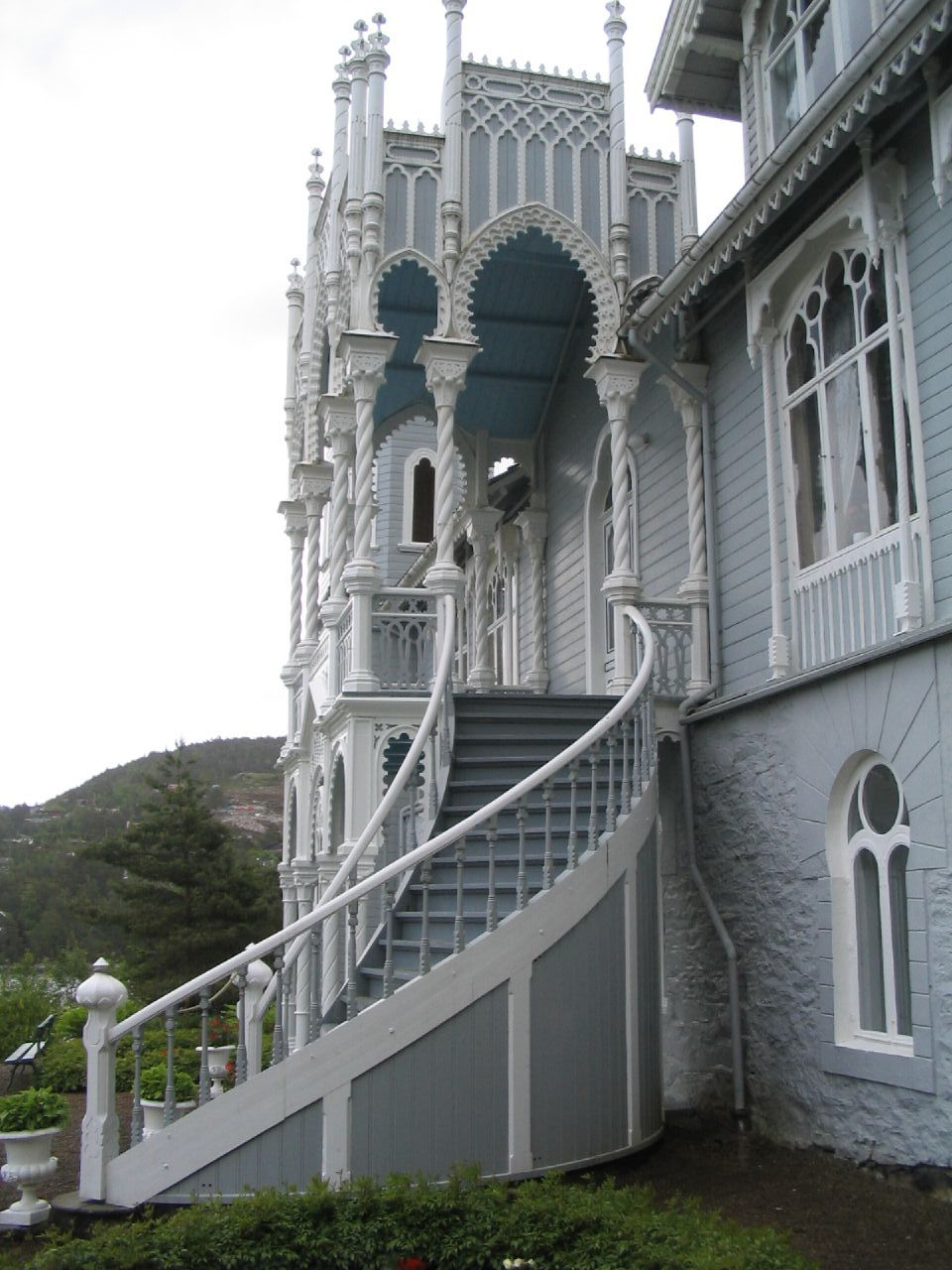 Inngangstrapp i Ole Bulls villa.